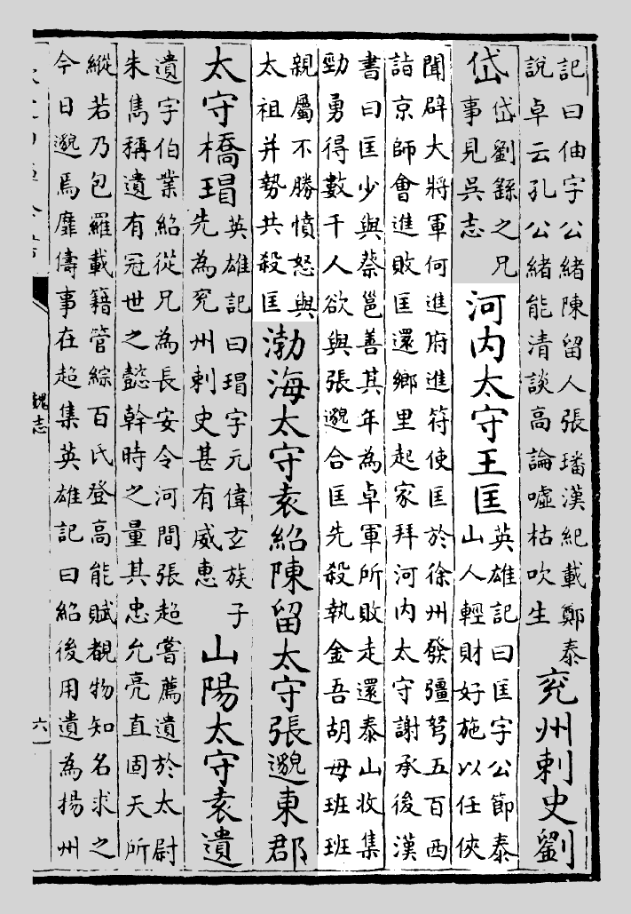 《三國志·魏書一·武帝紀》關於王匡的記載。（出自欽定四庫全書薈要）